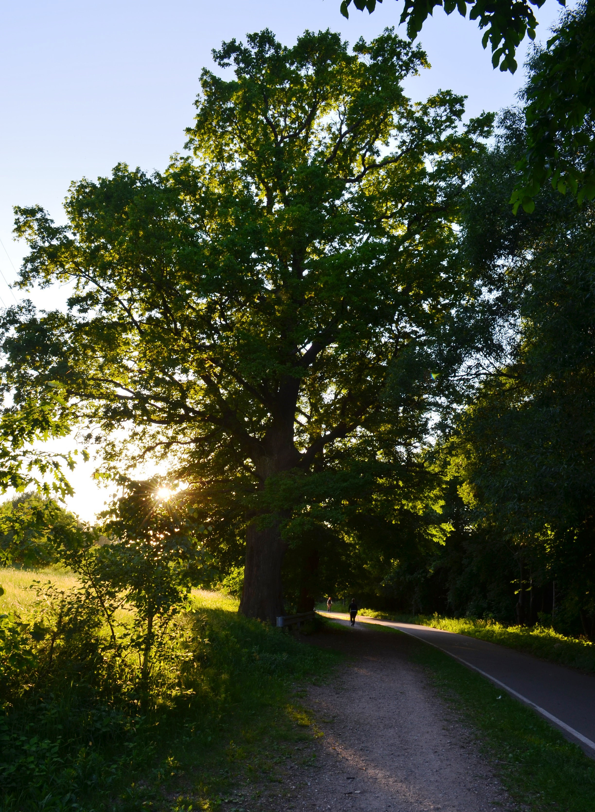 Žirmūnų ąžuolas netoli Valakupių tilto, Vilnius